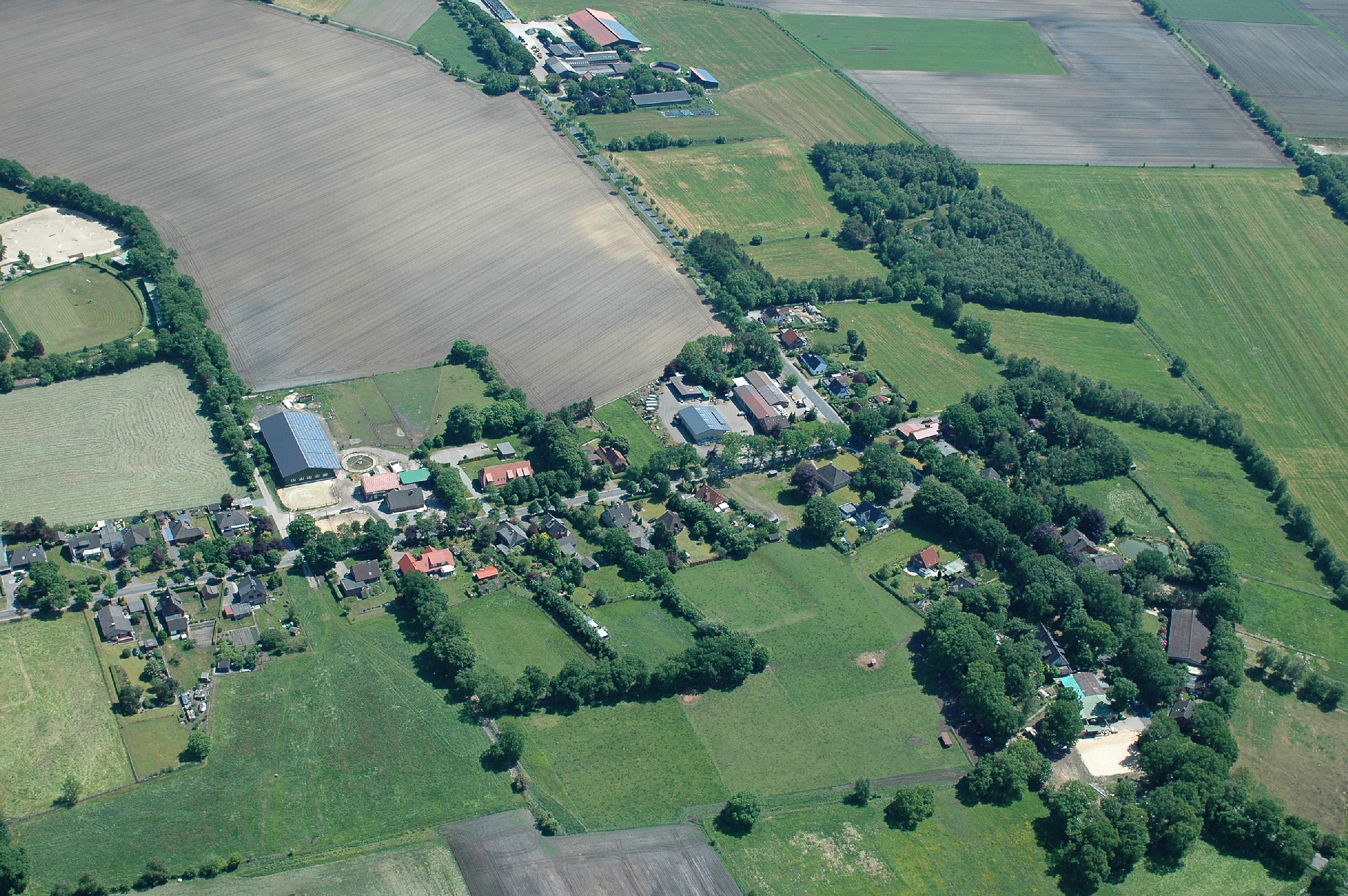 Luftbild von Elmlohe. Mühlenweg / Kührstedter Straße. Aus Serie: Fotoflug vom Flugplatz Nordholz-Spieka über Cuxhaven und Wilhelmshaven